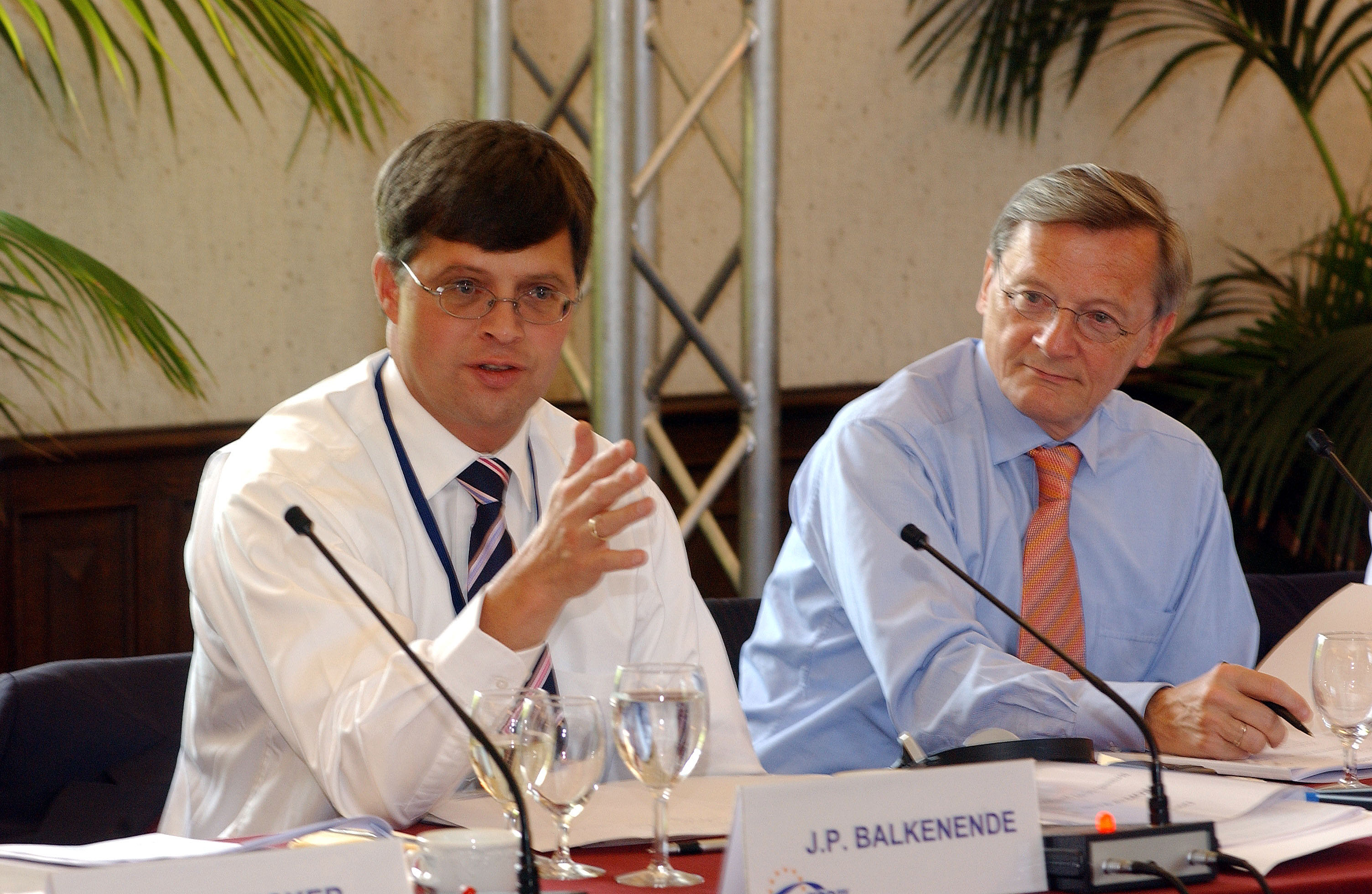 EPP Summit 16 June 2005